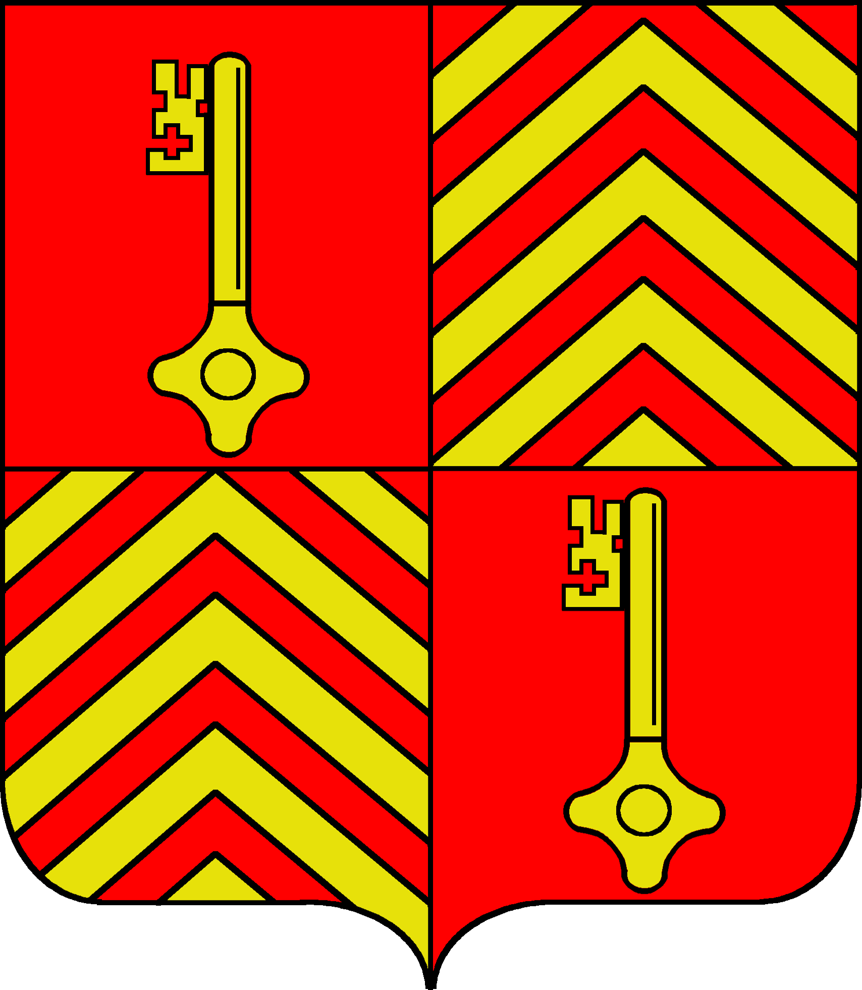 Blason de la commune de NOYELLETTE, basé sur les archives municipales.